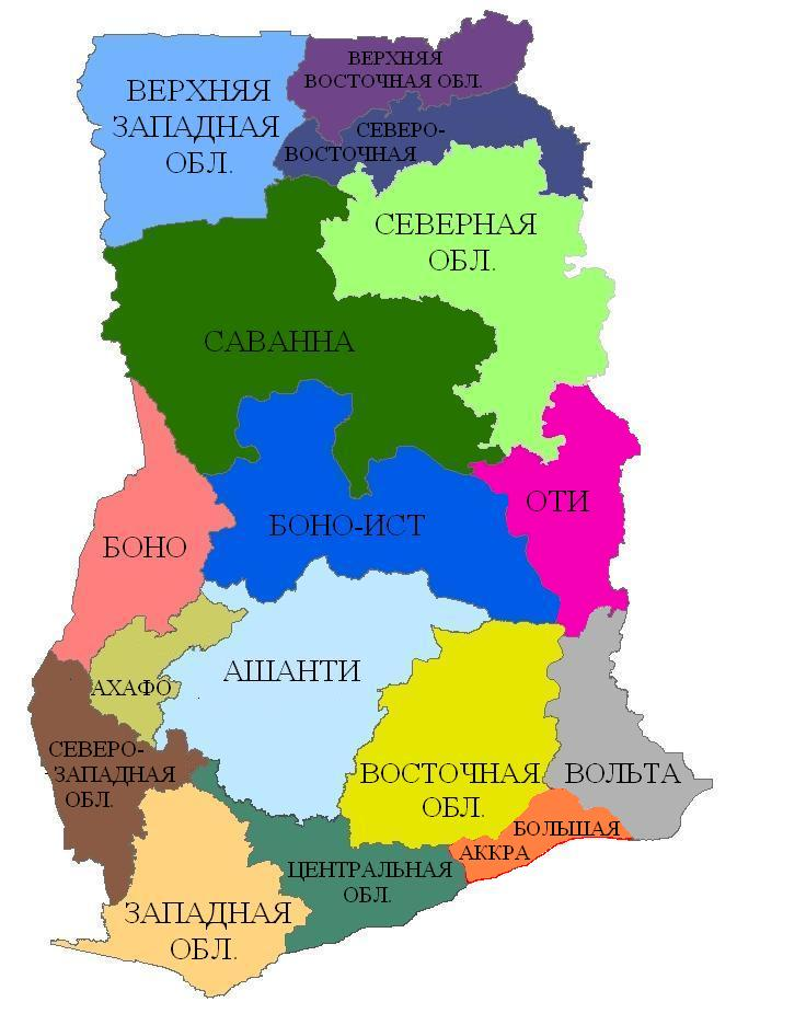 Области Ганы с названиями